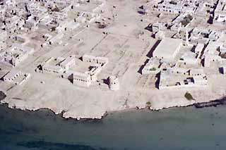 بلدة دارين عام 1970 حيث كان يصل مدّ البحر إلى قلعة دارين وقصر الفيحاني.